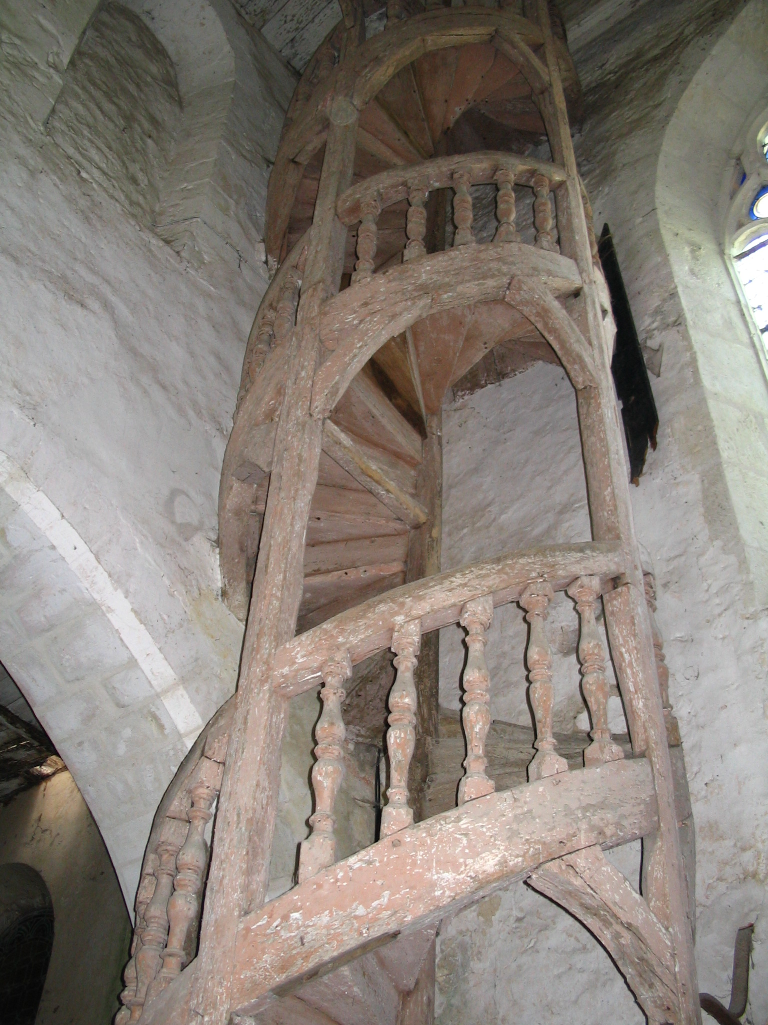 Escalier à vis du clocher (XVIIe siècle)- La Ferté-Loupière - Yonne - France